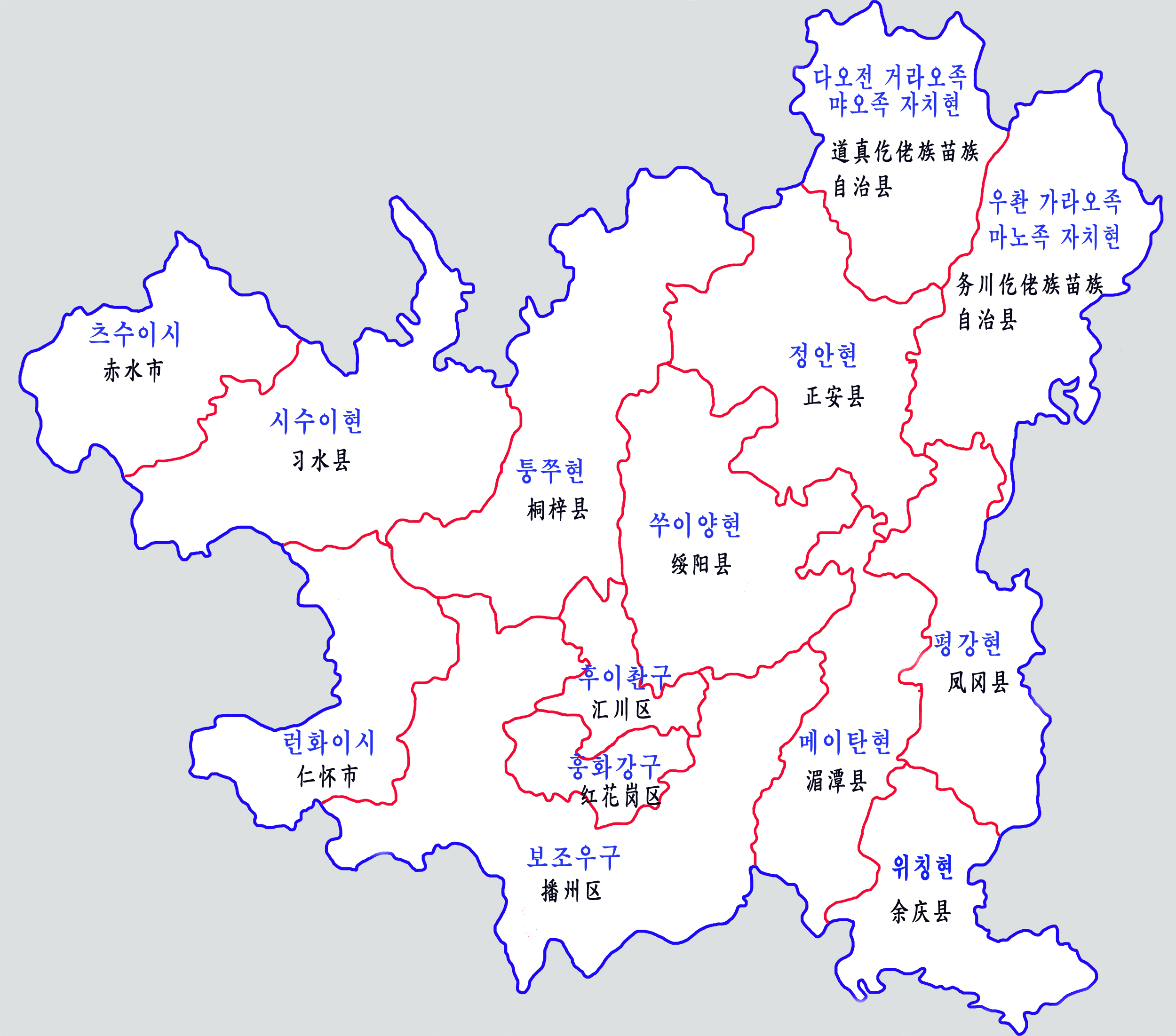 준이시 행정구역